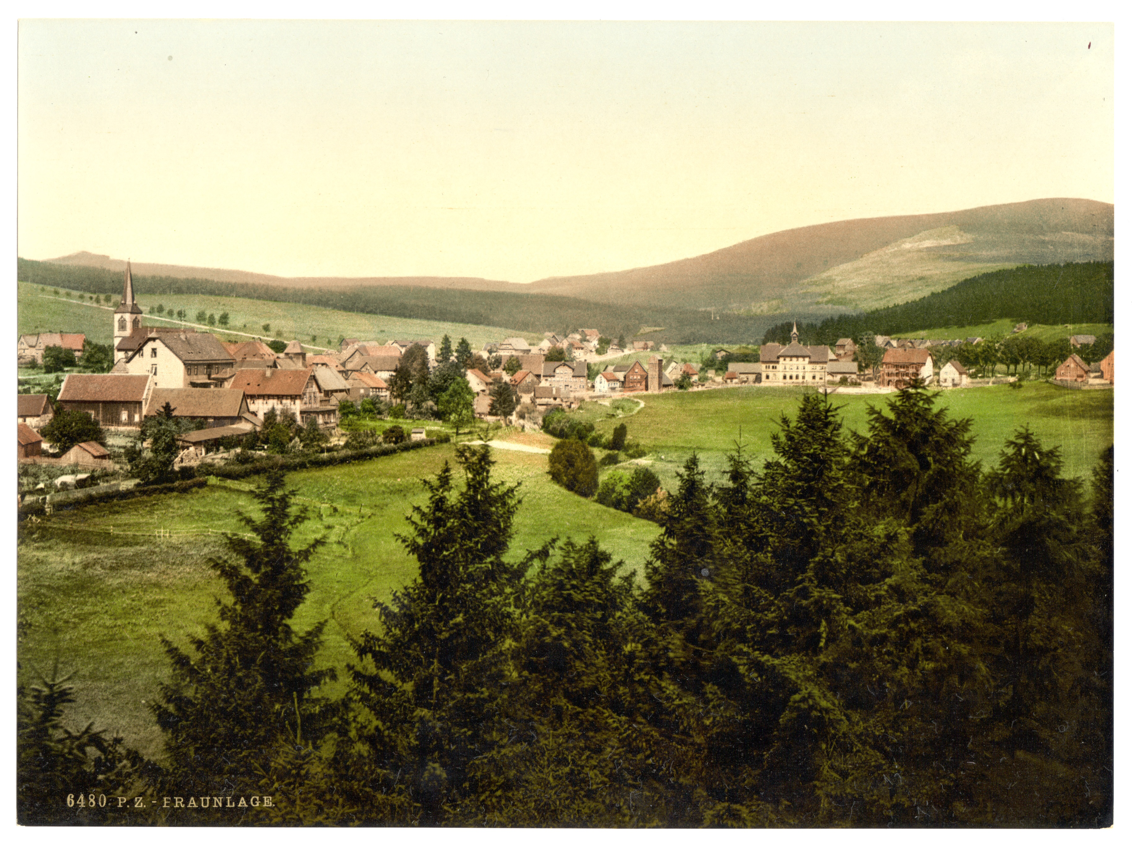 Braunlage